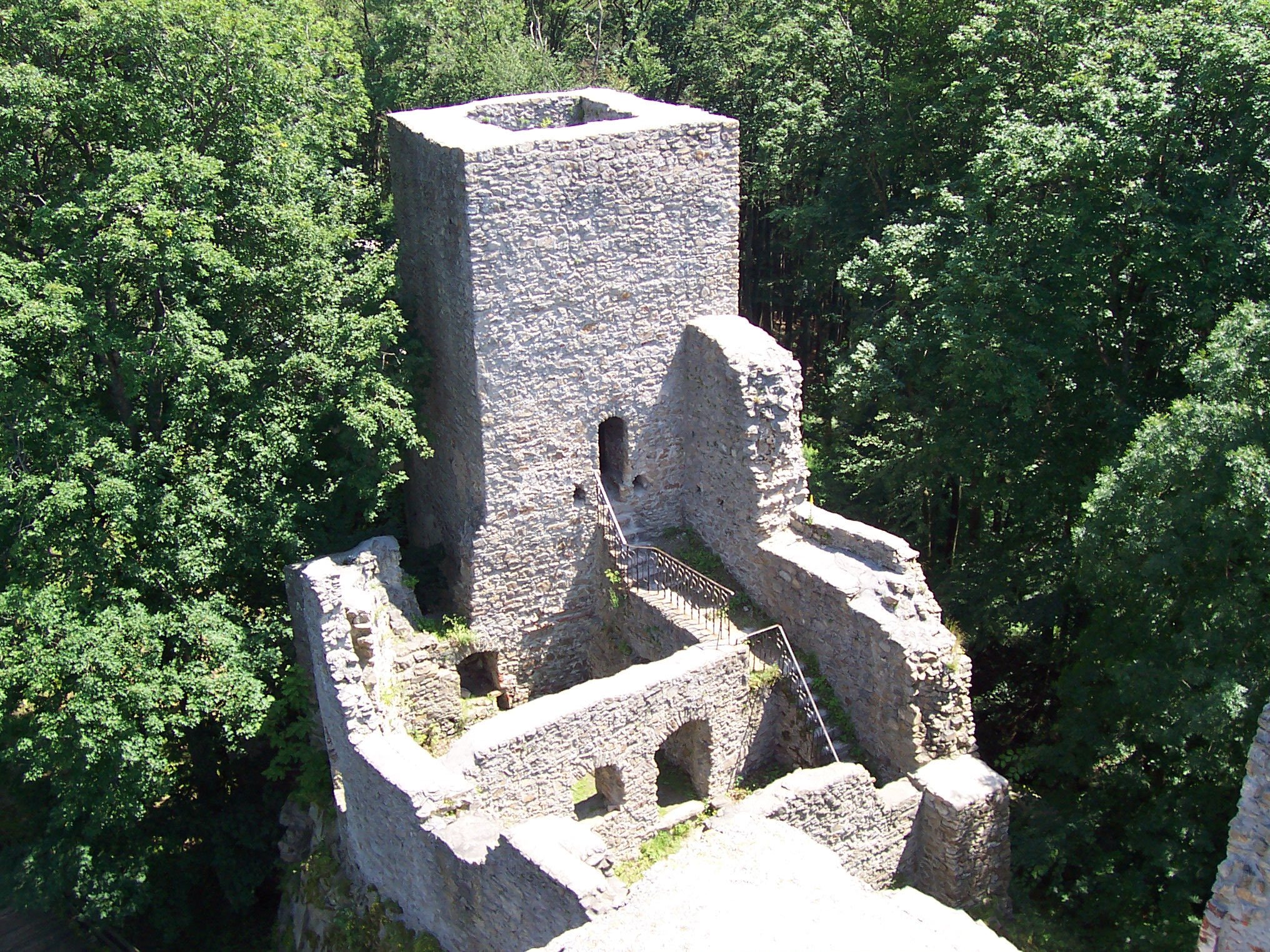 Hrad Choustník, věž, pohled z druhé věže / Choustník, tower, view from second tower